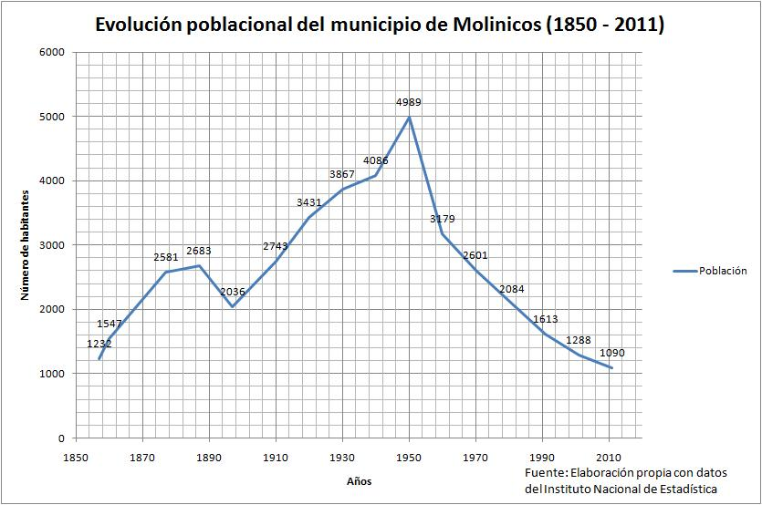 Gráficocon la evolución poblacional del municipio de Molinicos desde su emancipación hasta 2011